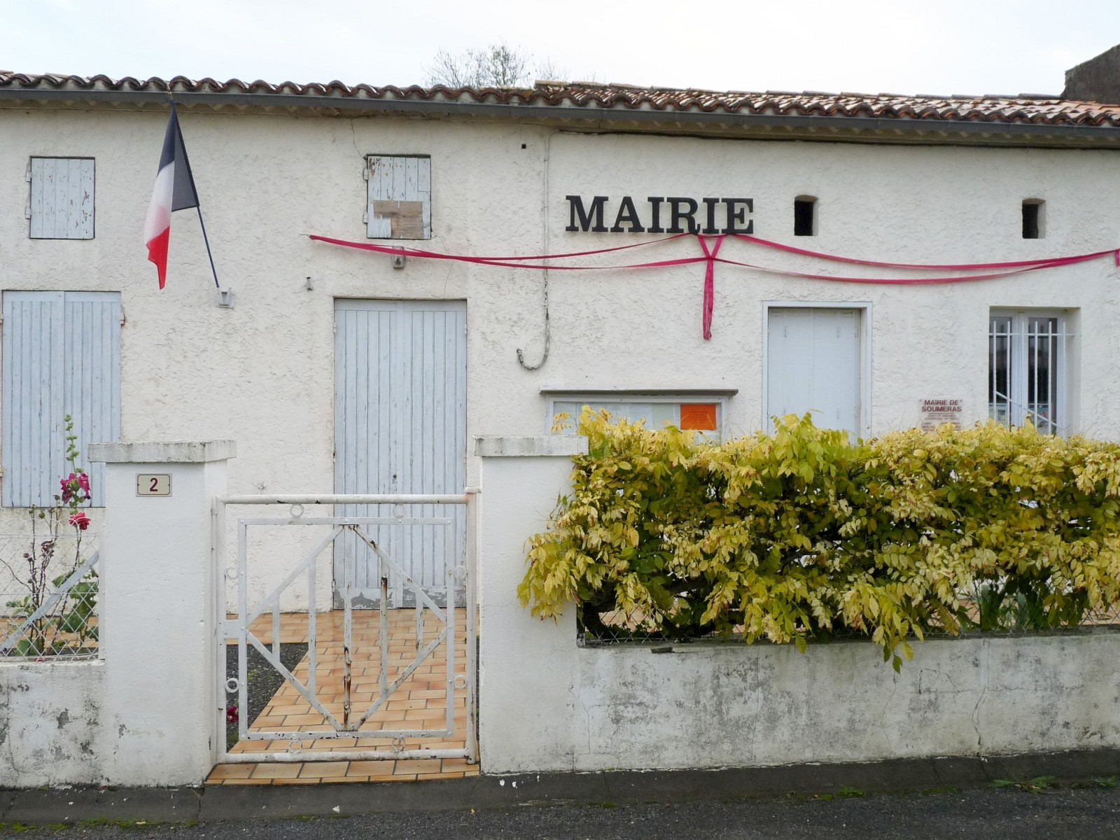 Mairie de Souméras, Charente-Maritime, France